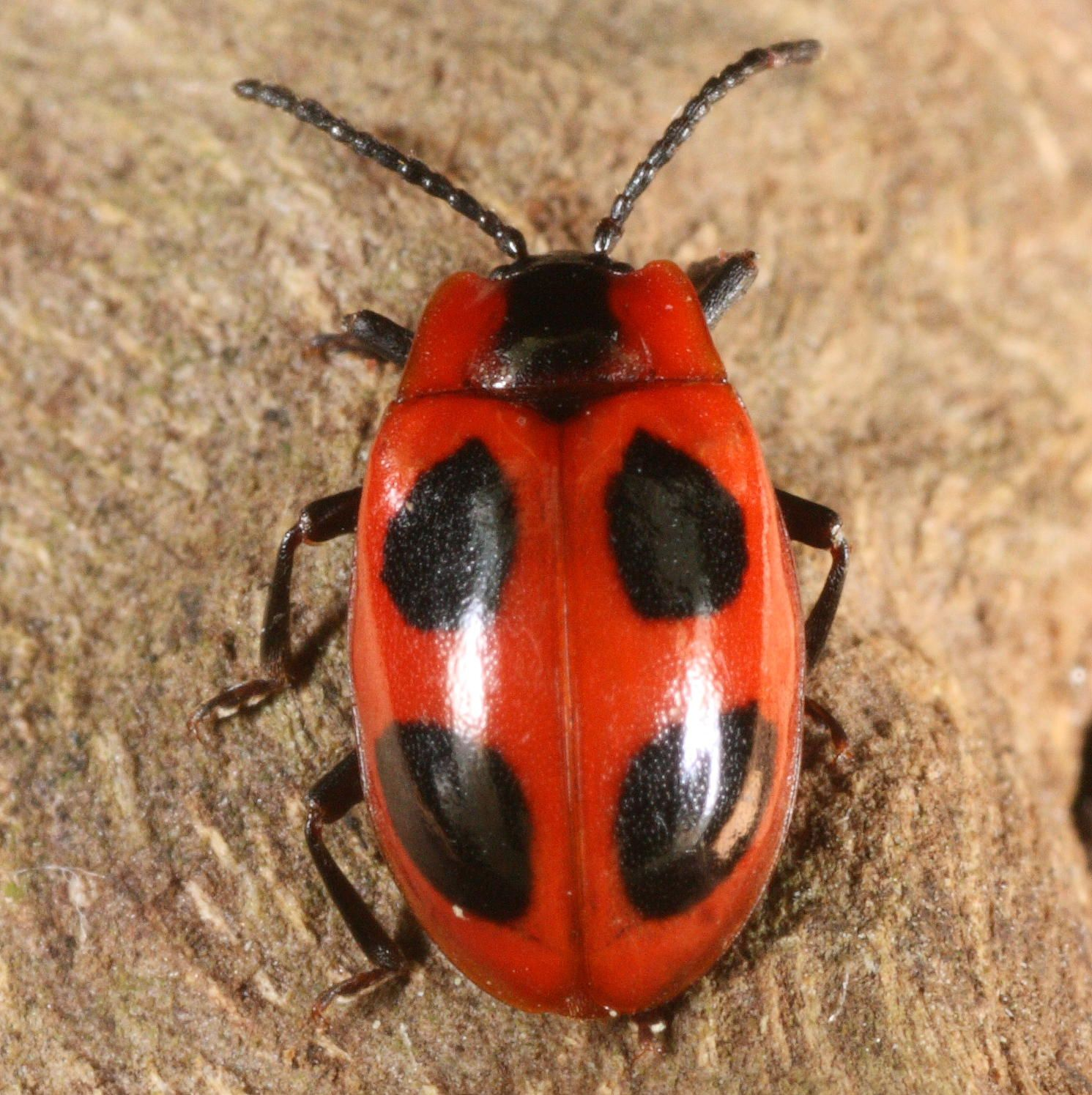 Soppmarihøna Endomychus coccineus med to vinger eller lengdefurer på brystskjoldet.Template:Byline